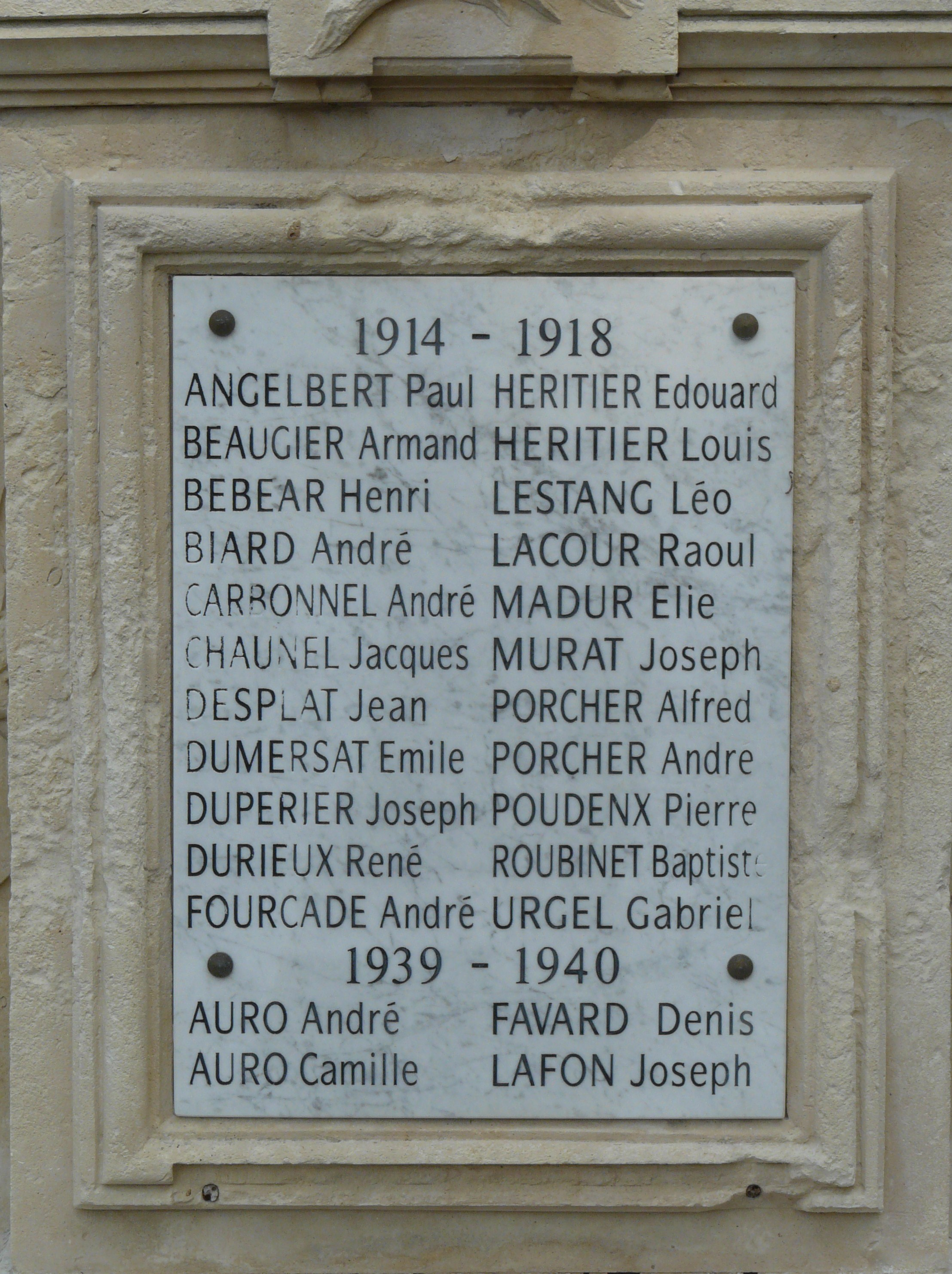 Monument aux morts de Grignols, Dordogne, France.